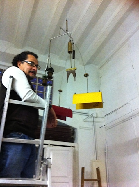 Escultor Miguel Peraza colocando movil en galería Diígenes Barcelona España